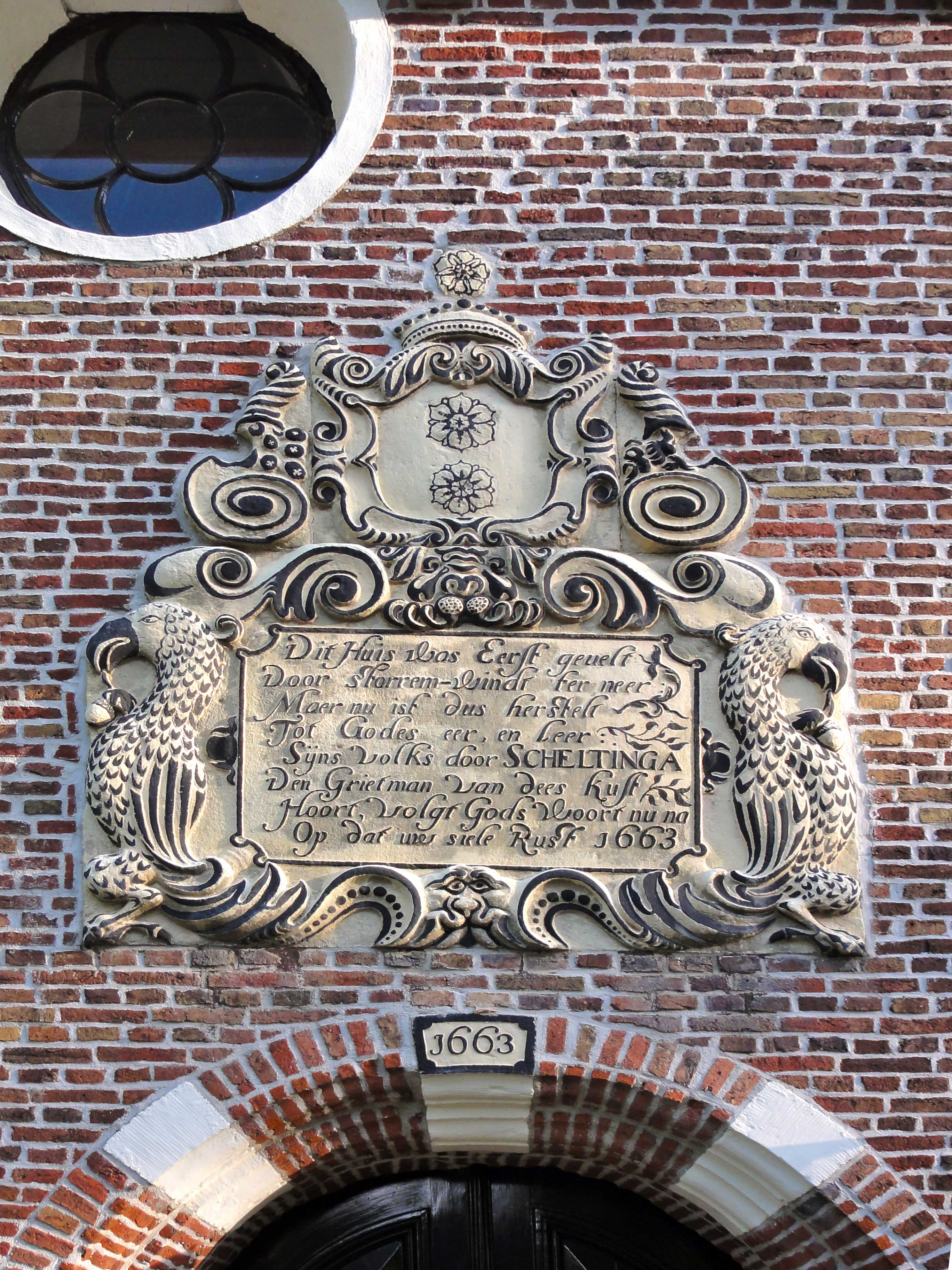 Kerk van Harich